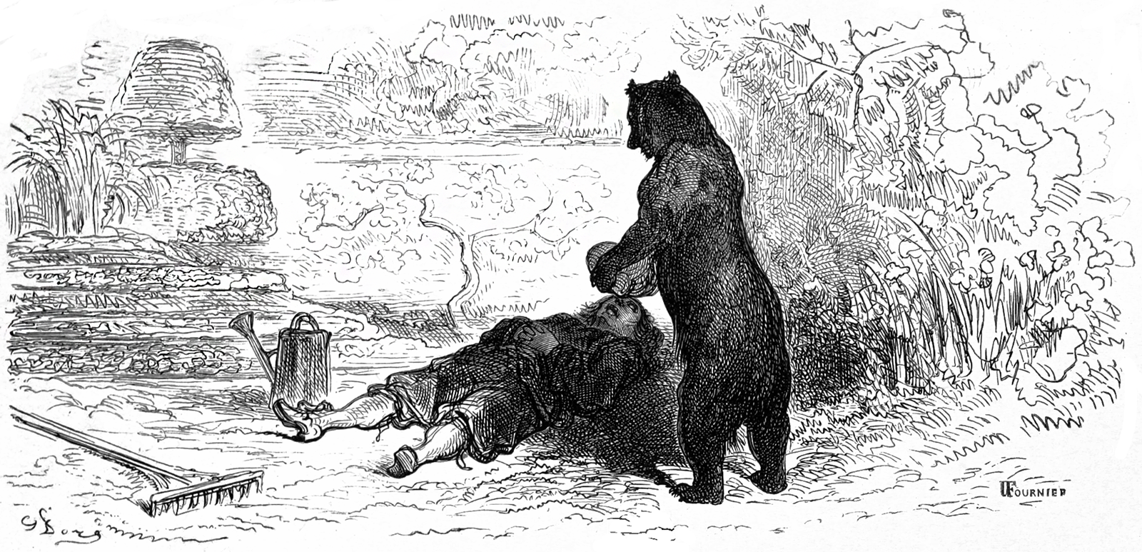 grafika z książki PL Bajki, Jean de La Fontaine, nakładem i drukiem Jana Noskowskiego, Warszawa 1876